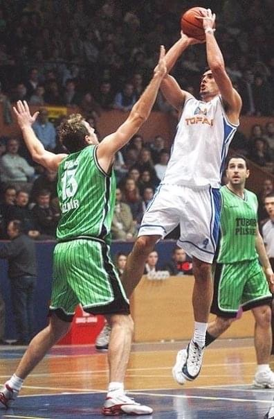 Melih Yavşaner Tofaş formasıyla